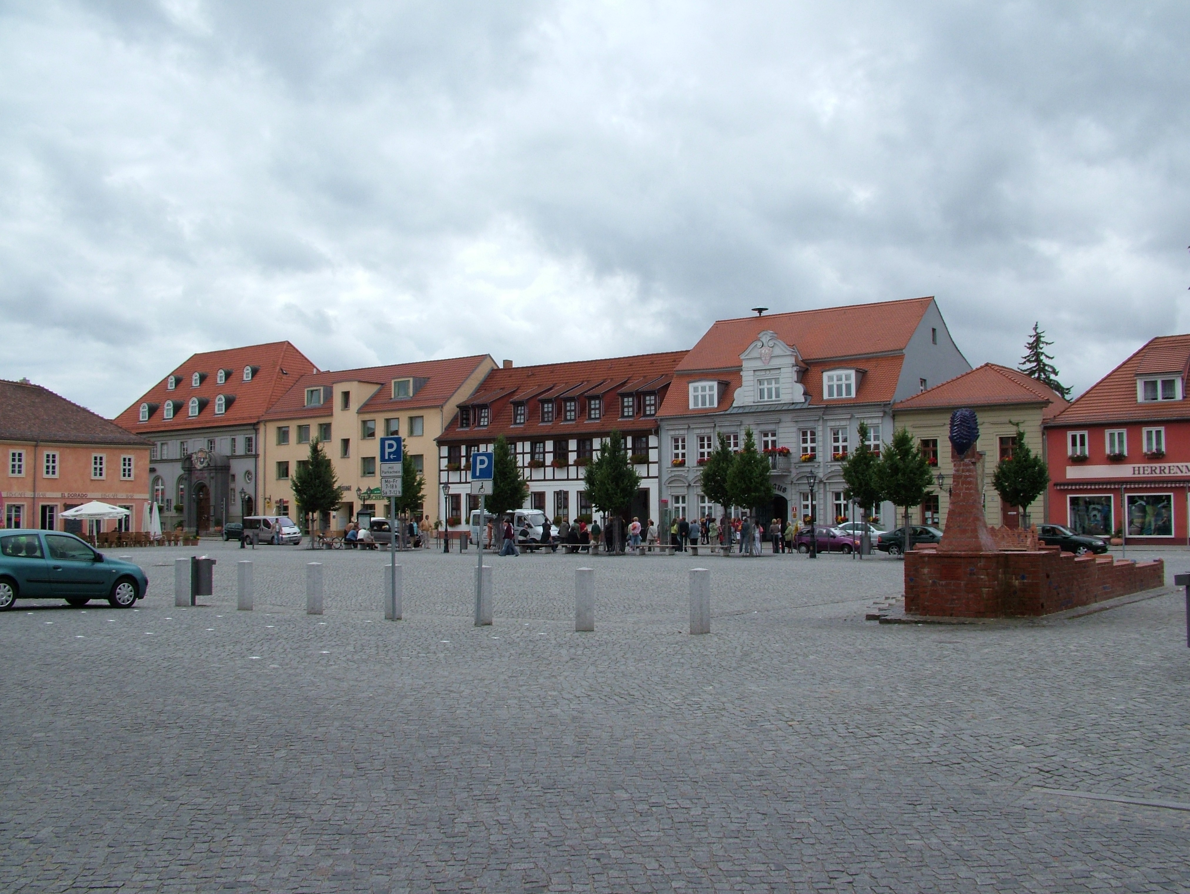 Der Marktplatz von Beeskow, Brandenburg. Das rechte graue Gebäude ist das Rathaus